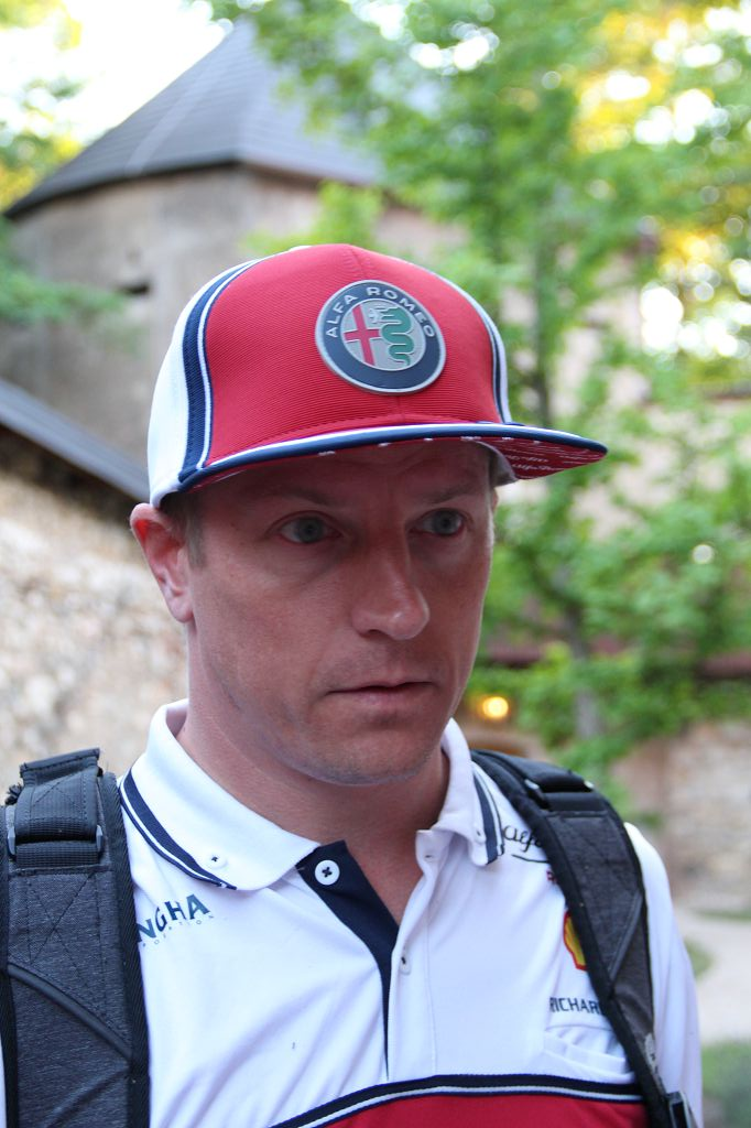 Formula 1 2019 / Schloss Gabelhofen